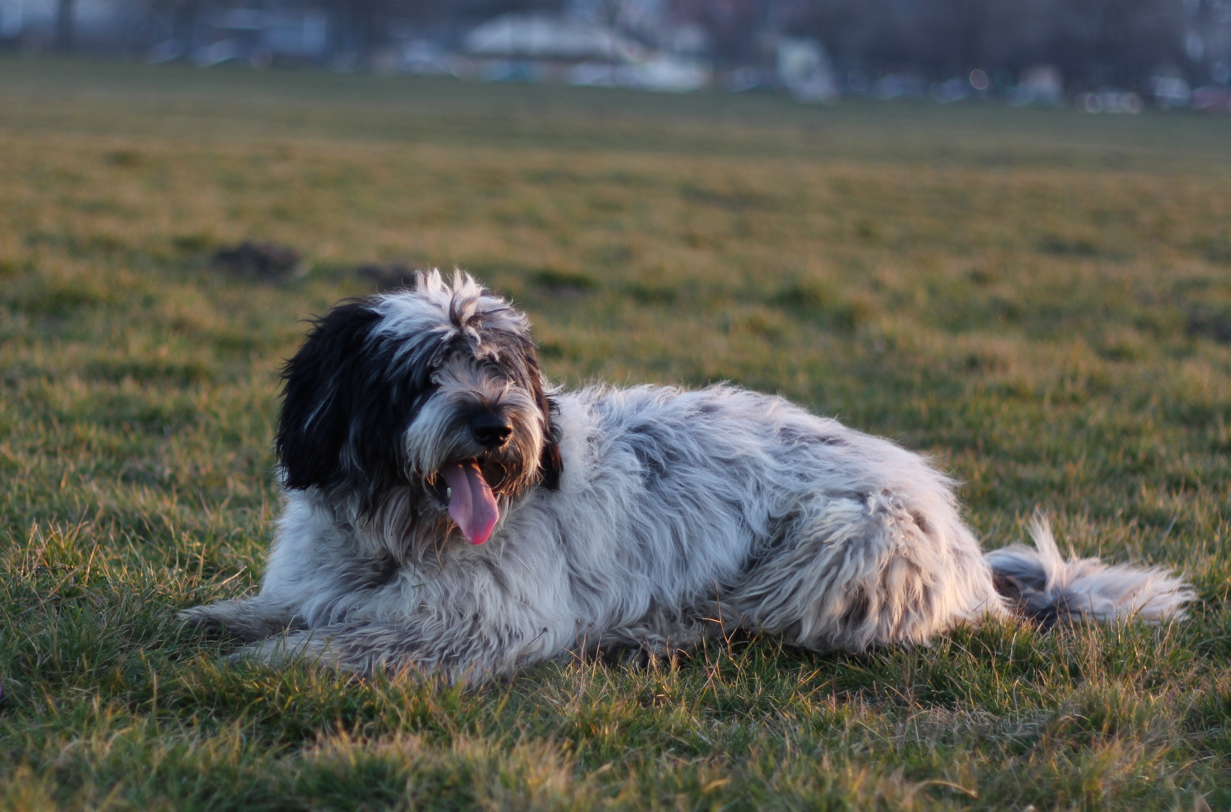 Bruno, dwuletni polski owczarek nizinny.